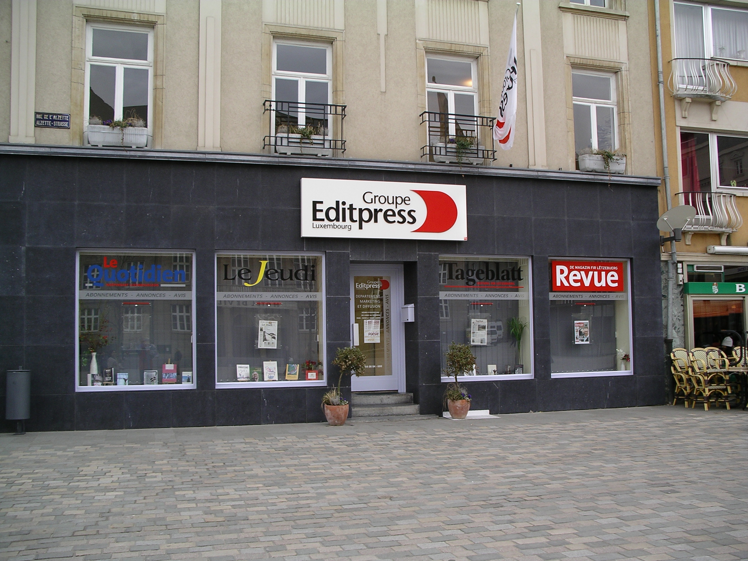 Geschäftsstelle der editpress Luxembourg SA in Esch sur Alzette